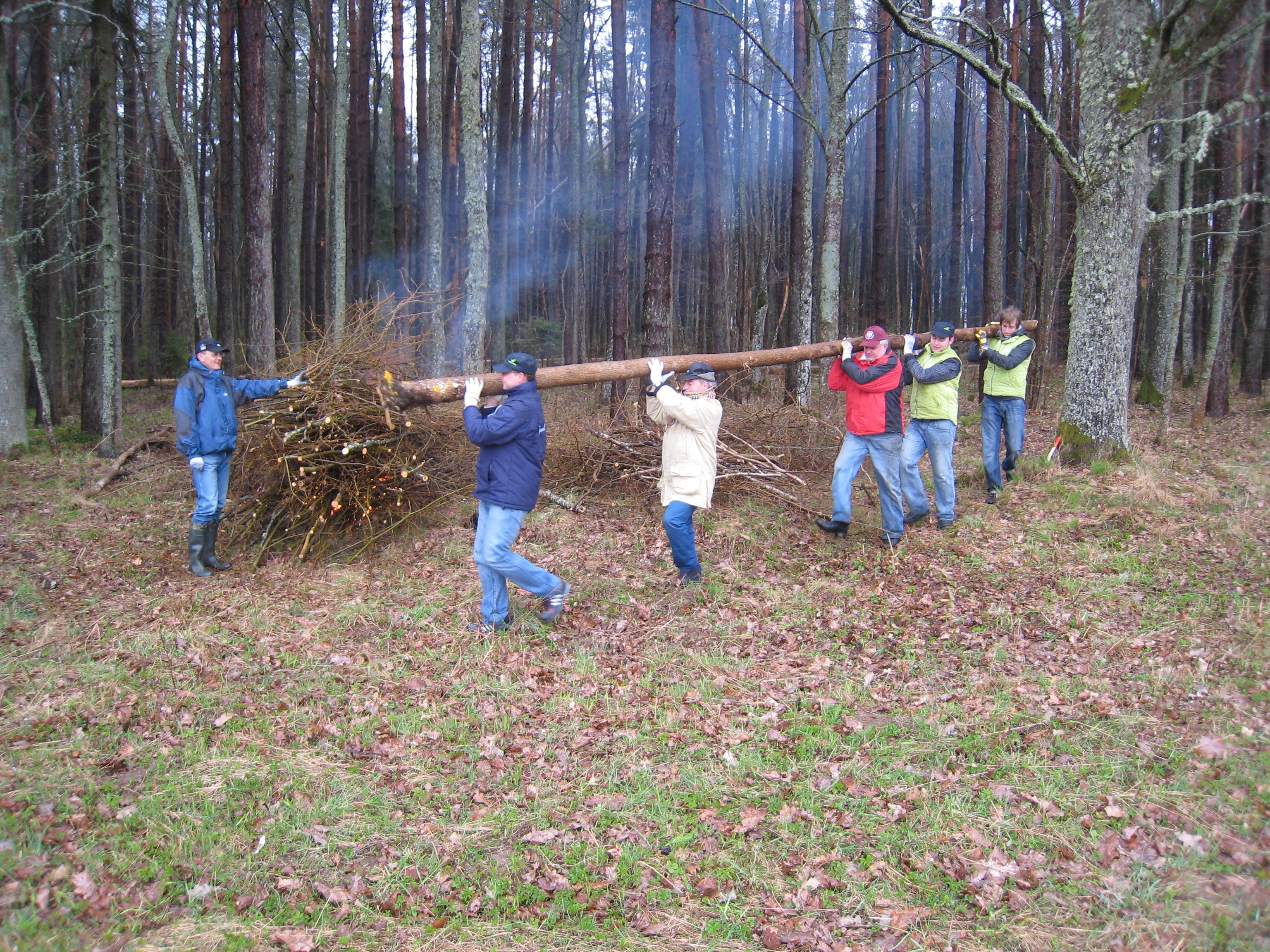 Ministru prezidents un valdības sociālie partneri piedaloties Lielajā Talkā Foto: Valsts kanceleja